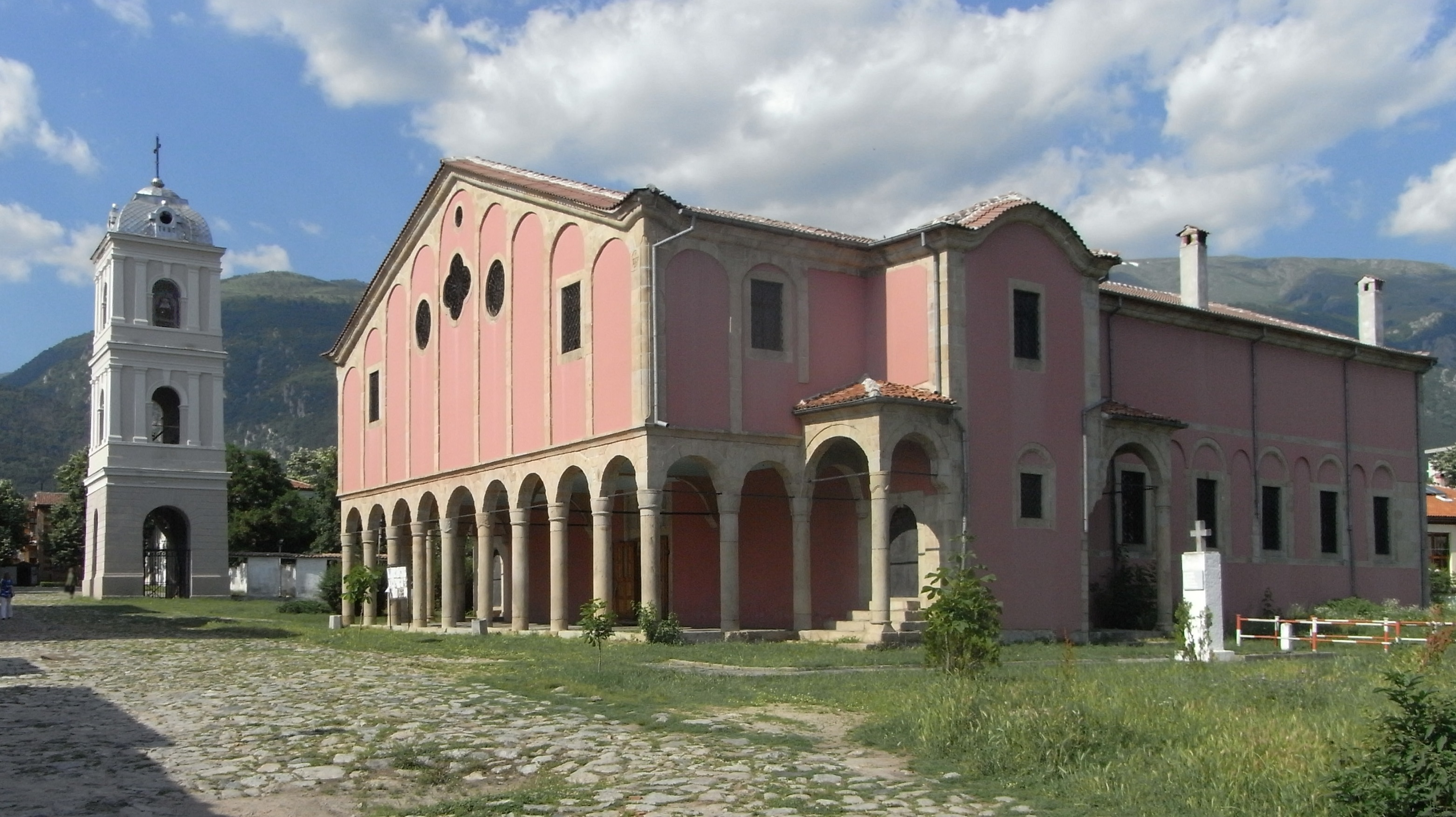 St-Nikolaus-Kirche in Karlovo